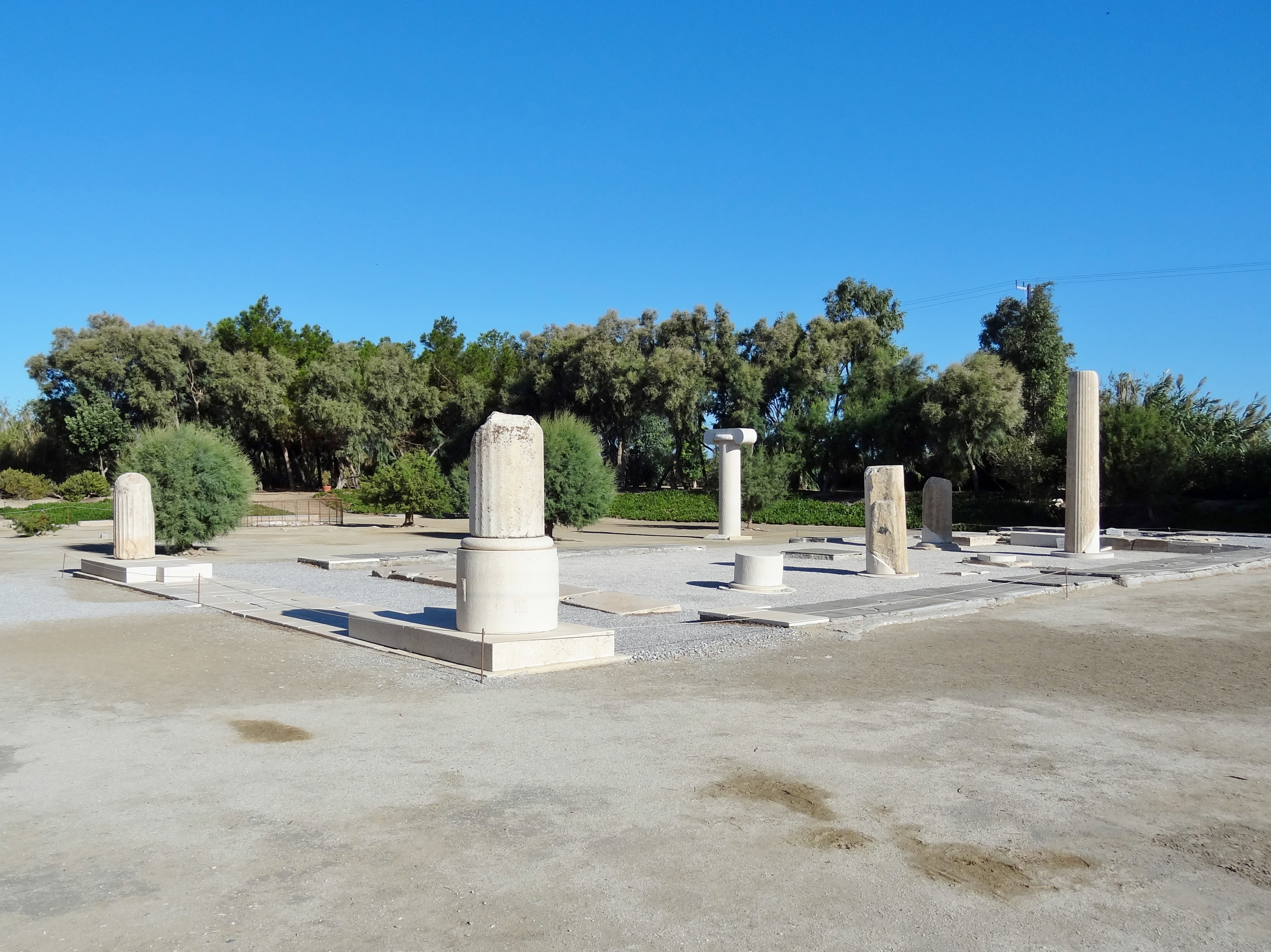 Tempel des Dionysos von Yria auf Naxos, Kykladen, Griechenland